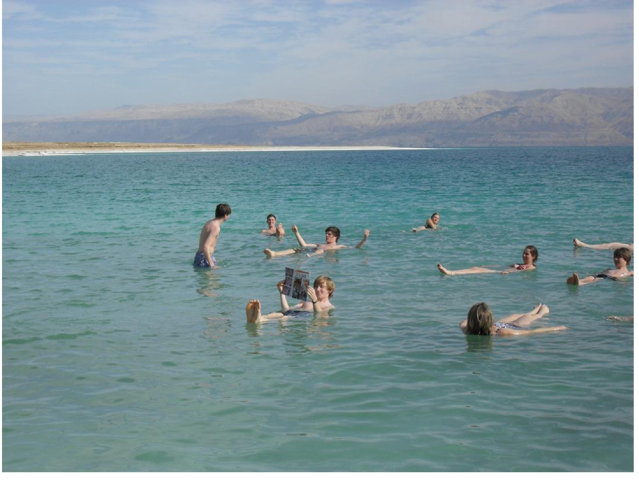 Bild am toten Meer